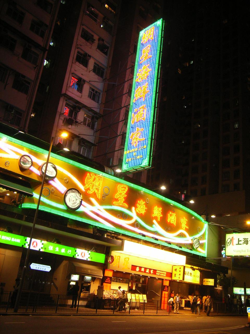 牛頭角道165號地下, 偉景樓之現場. Author= Kwanyatsw